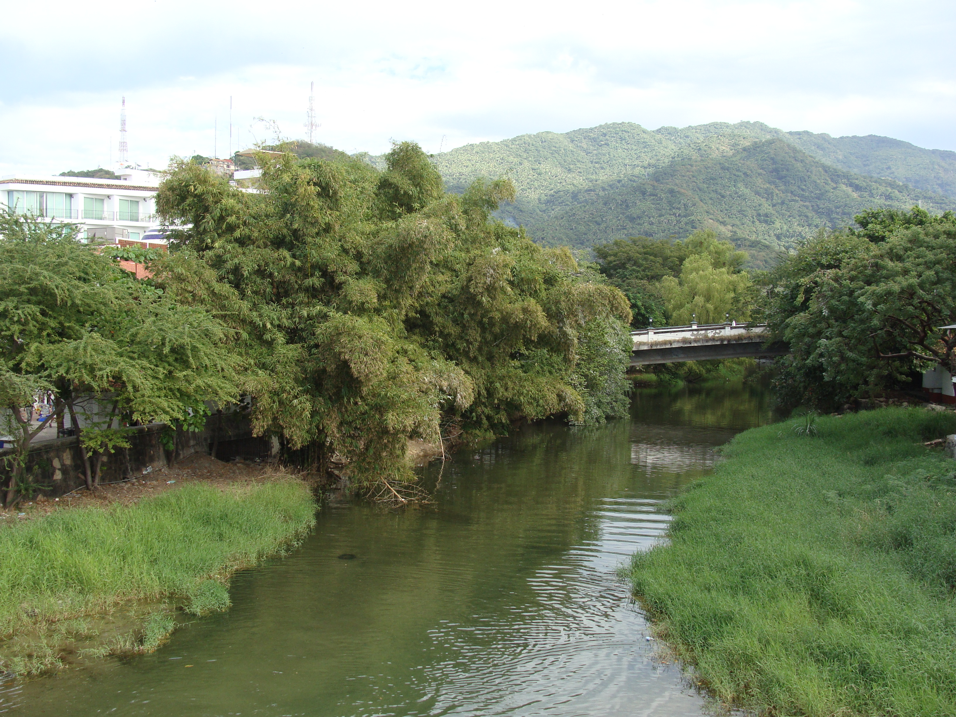 Puerto Vallarta, au Mexique.